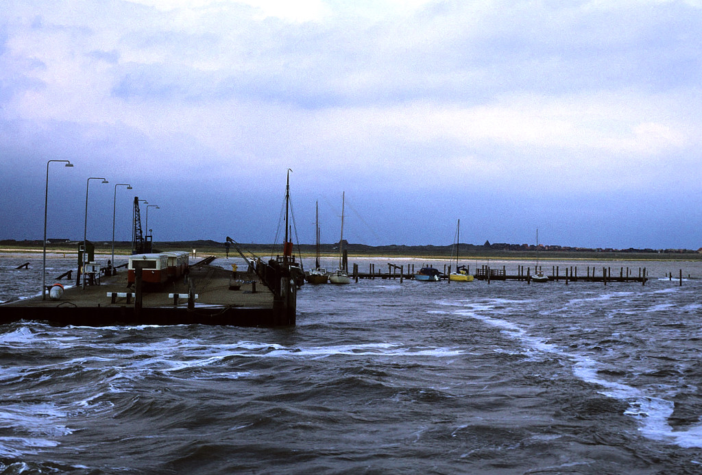 Vierter Anleger Spiekeroog seit 1962: Ab 1965 von der Inselbahn für den Personenverkehr, ab 1968 auch für den Güterverkehr benutzt. 1981 Stilllegung als Hauptanleger, nachfolgend zunehmende Zerstörung durch die Naturgewalten. 2007 wurde die Abtragung beschlossen, die zwischen August und Ende September 2009 durchgeführt wurde. An der Stelle des Anlegers existiert seither eine bei der Abtragung errichtete Buhne.